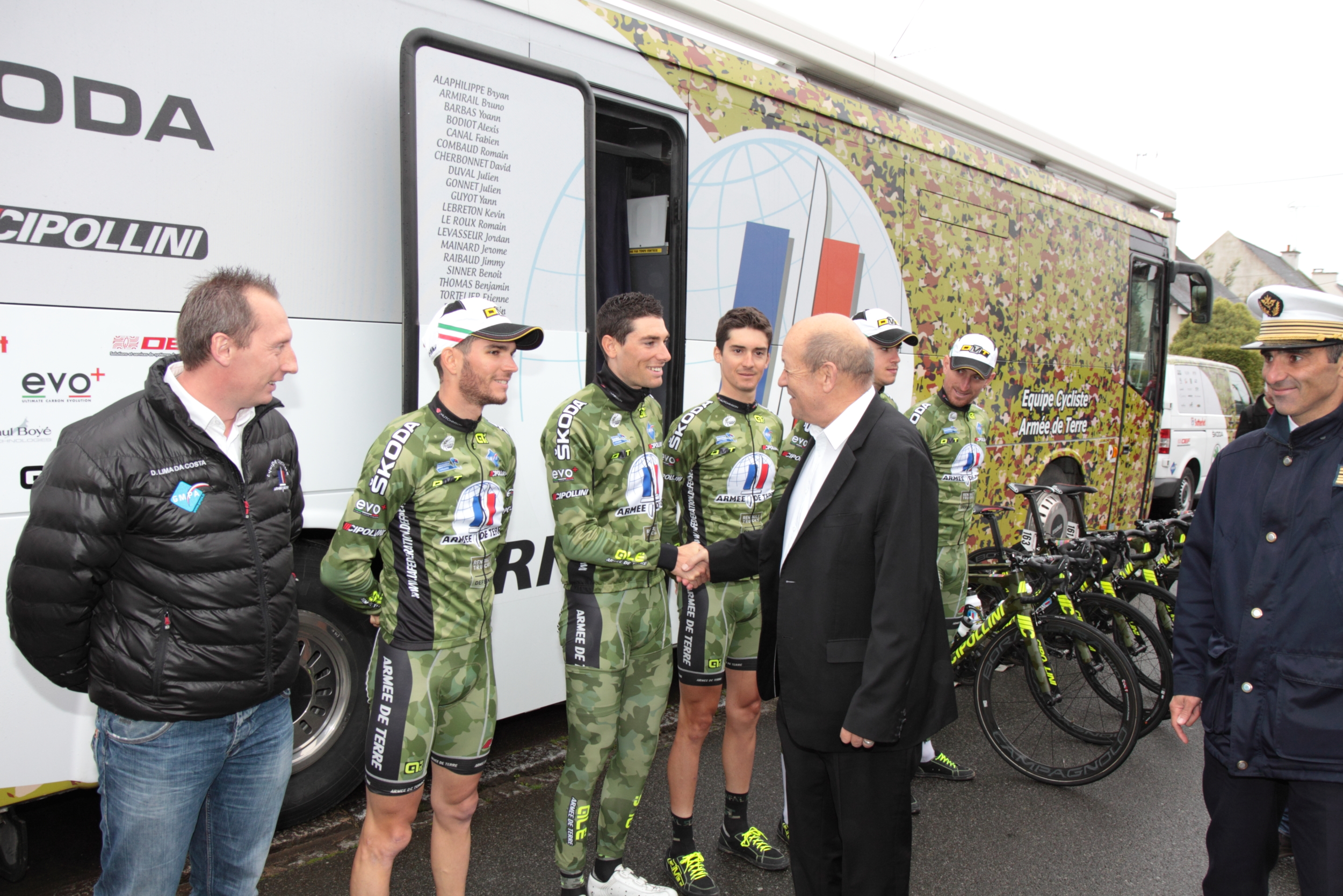 Tour de Bretagne, étape de Liffré le 1er mai 2015, Jean-Yves Le Drian rend visite à l'équipe de l'Armée de Terre avant l'épreuve